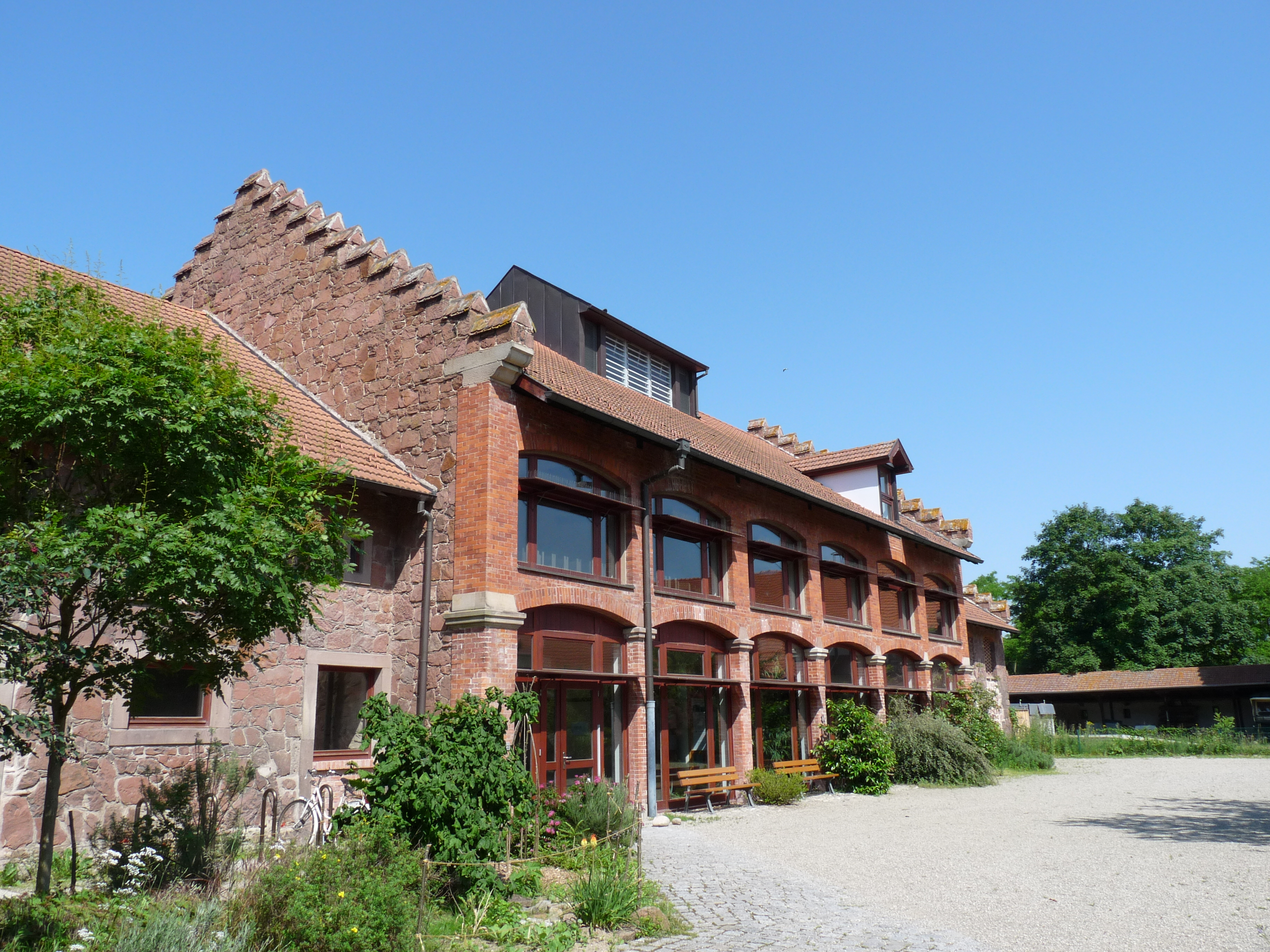 La Ferme Bussière à la lisière du parc de Pourtalès (Robertsau, Strasbourg). Alfred Renouard de Bussière la fit ériger en 1867. Architecte : Louis-Michel Boltz. Aujourd'hui Centre d'Initiation à l'Environnement